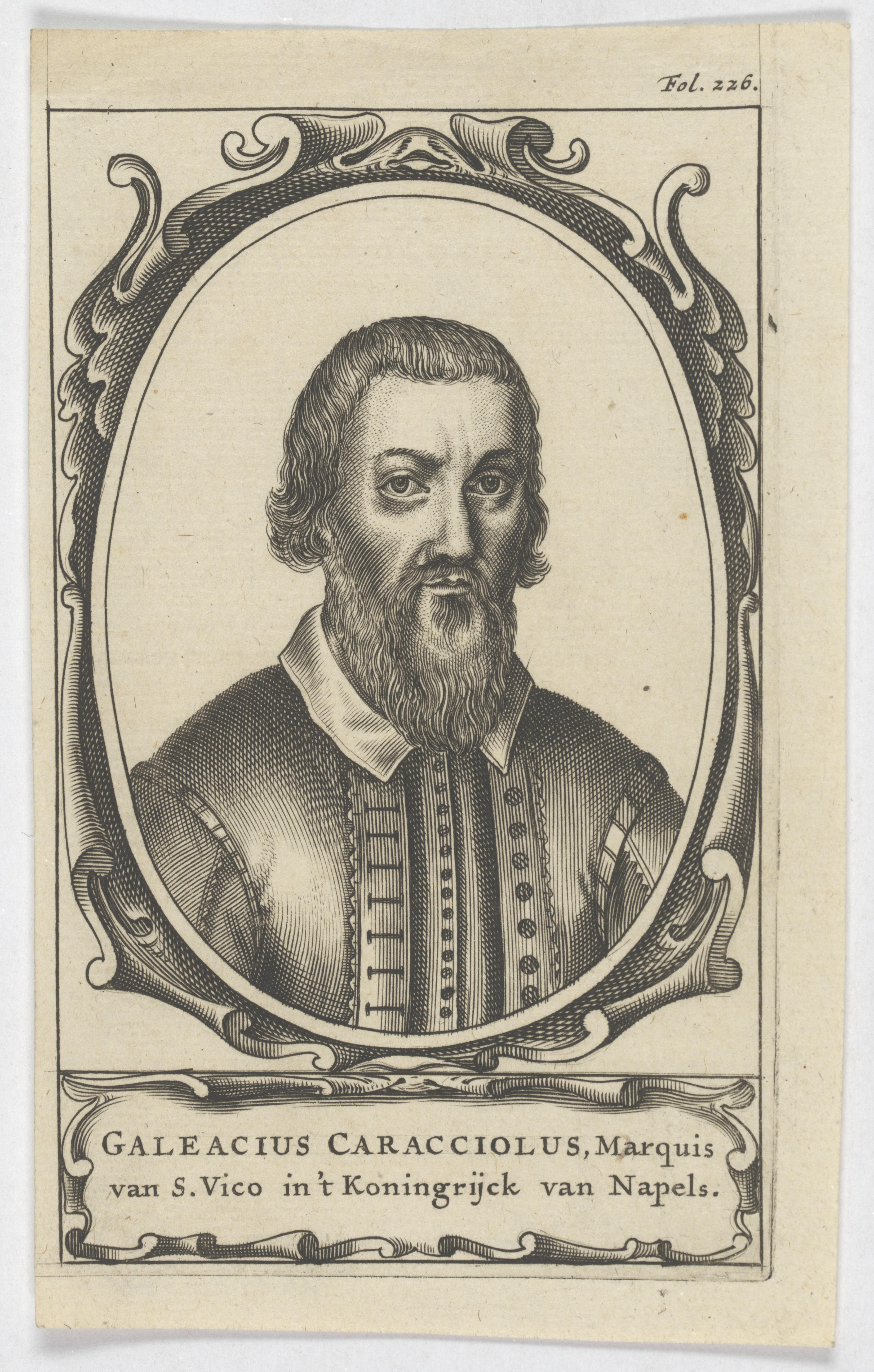 Portrait of Galeazzo Caracciolo